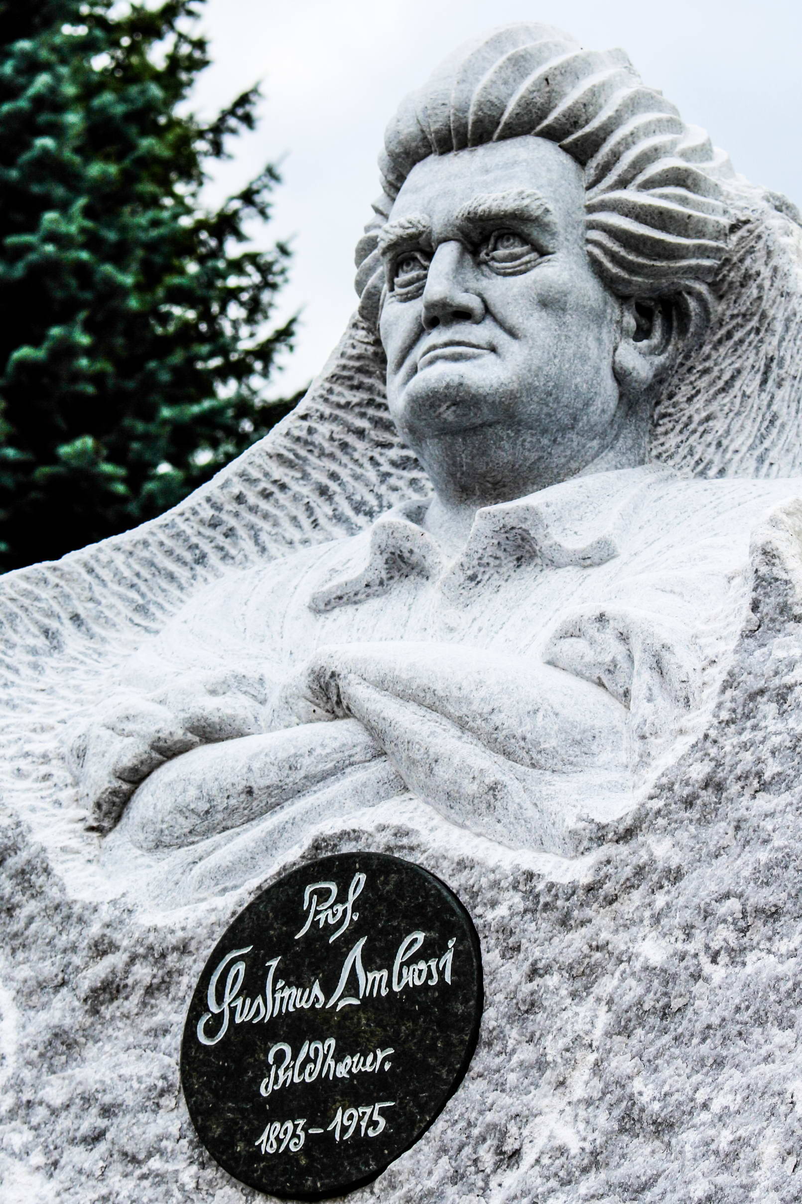 Stallhofen – „Prof. Gustinus Ambrosi-Gedenkstätte“ Dieses Bild wurde anlässlich des österreichischen Tags des Denkmals 2014 in der Steiermark eingereicht.